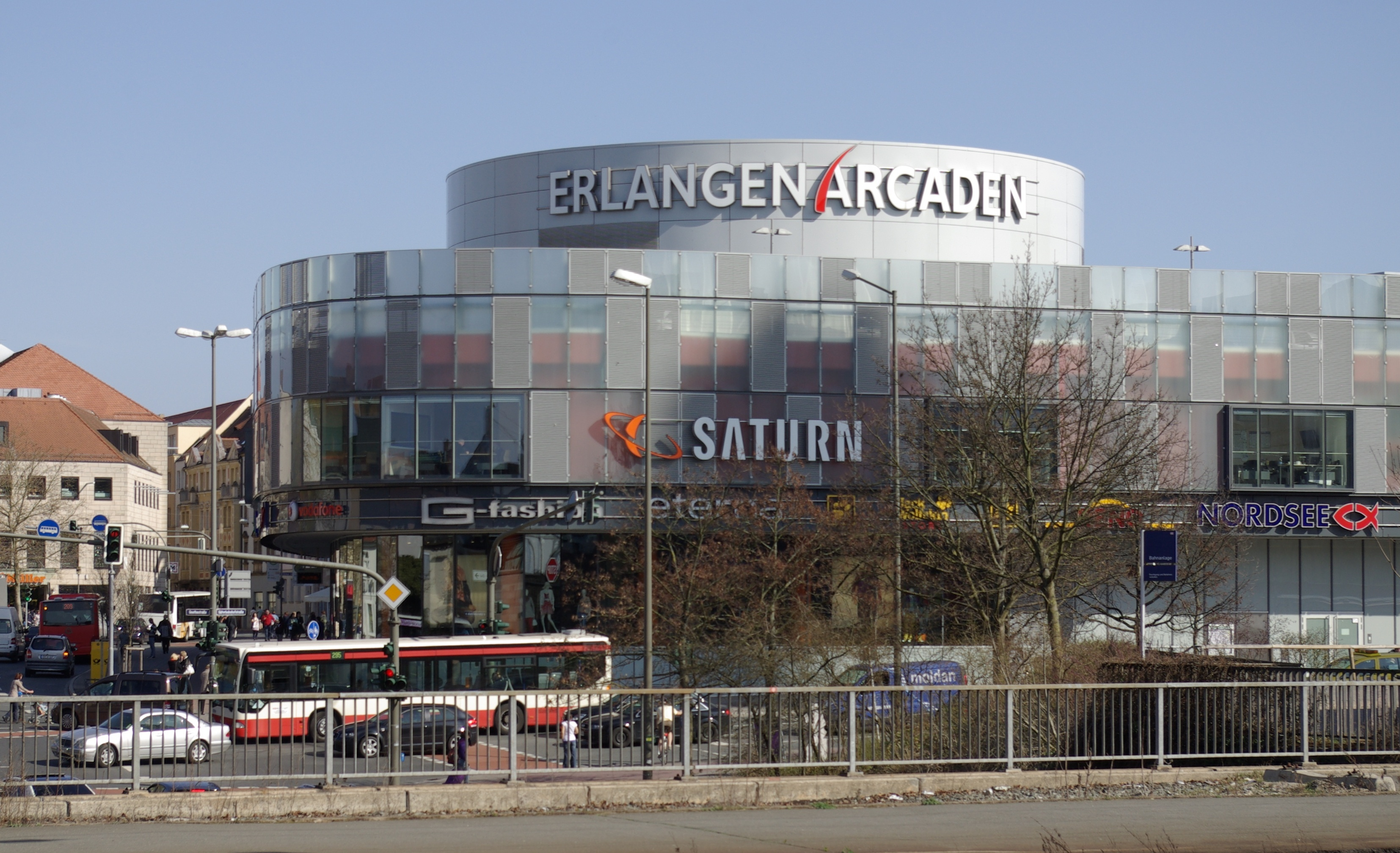 Einkaufszentrum Erlangen Arcaden in Erlangen